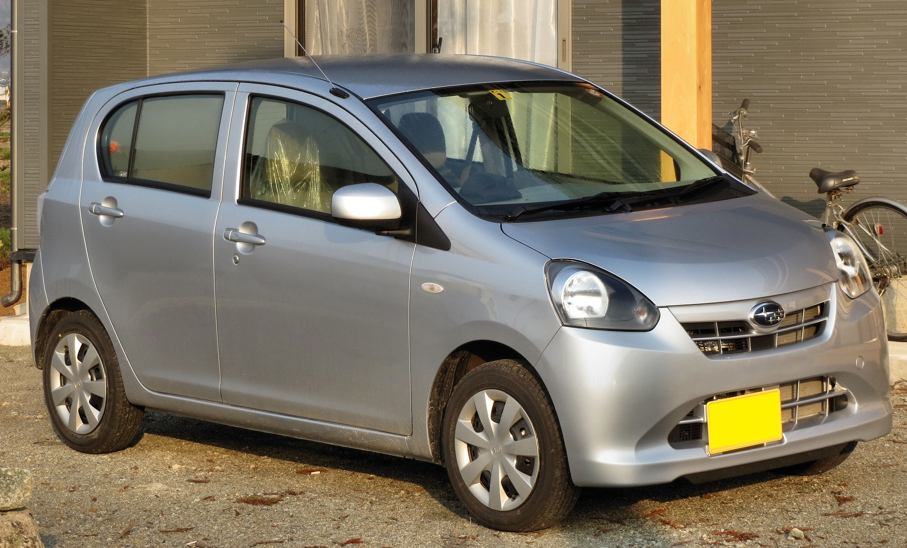 スバルプレオ＋